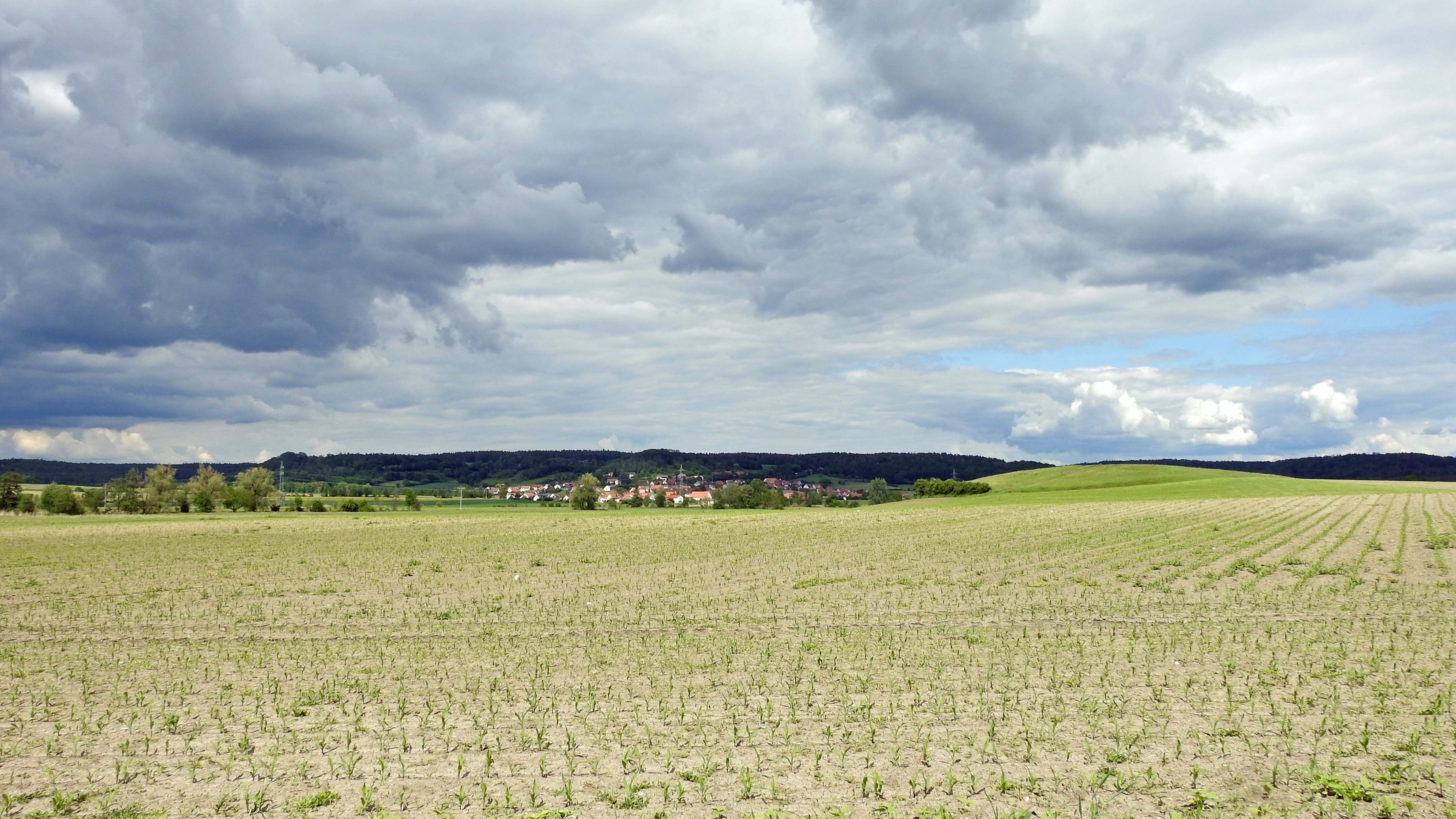 Baudenbach von Südwesten